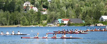 Championnat provincial de Canoë /Kayak. 3 au 5 août 2007. Lac-Beauport, Québec